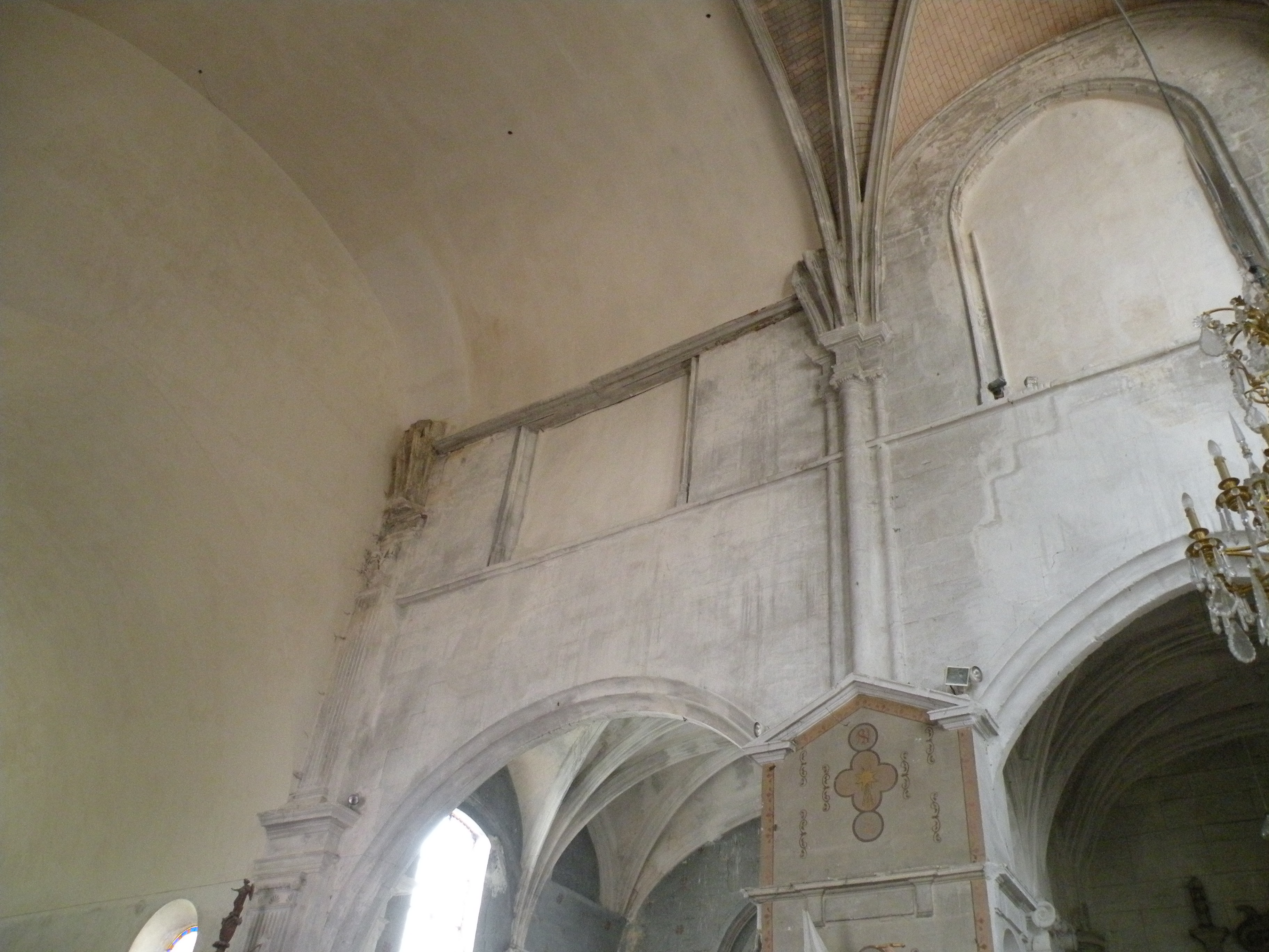 Église Saint-Denis de Sérifontaine detail du mur du choeur